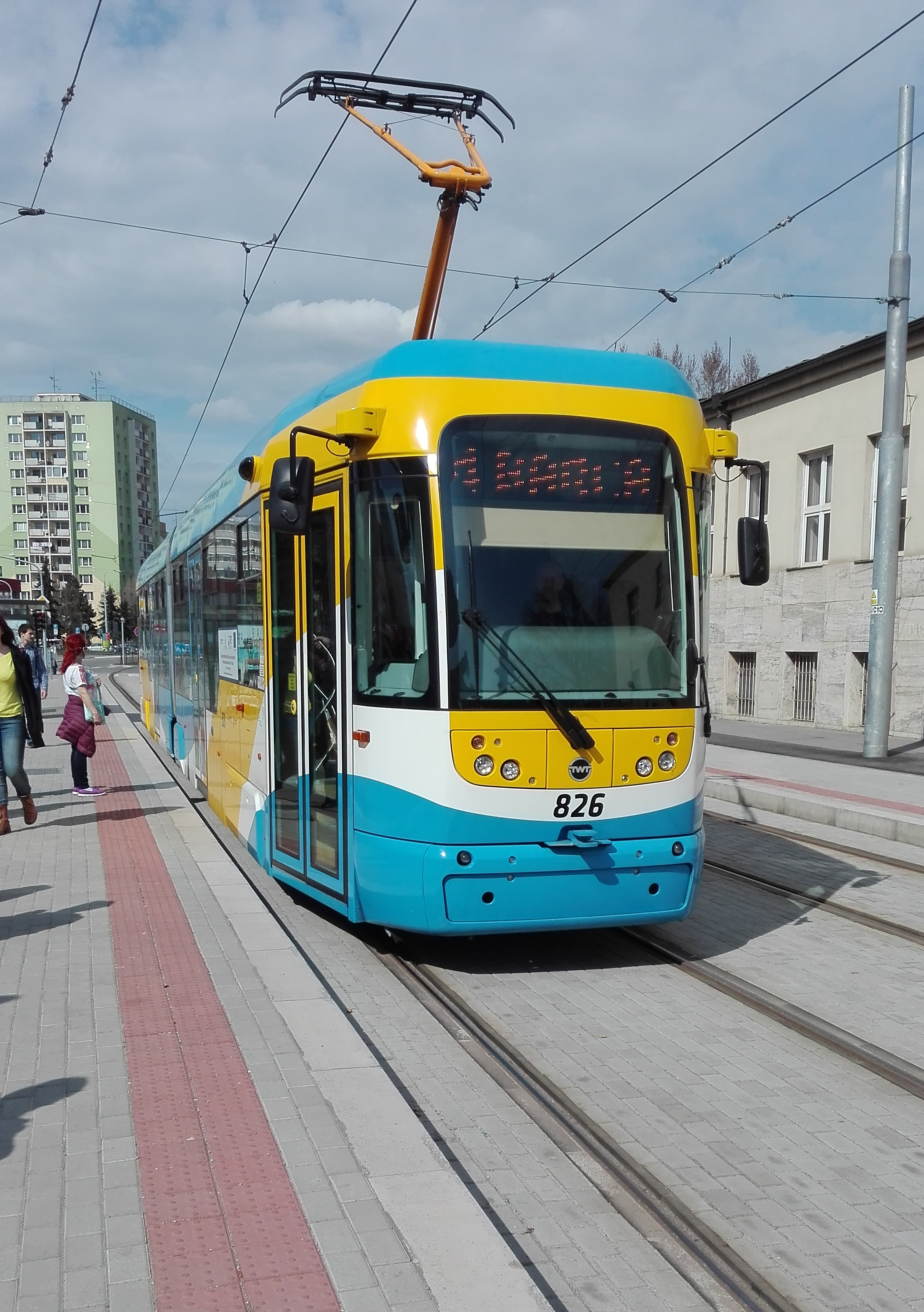 Vario FL2+ na linke 4 na Kuzmányho ulici v Košiciach